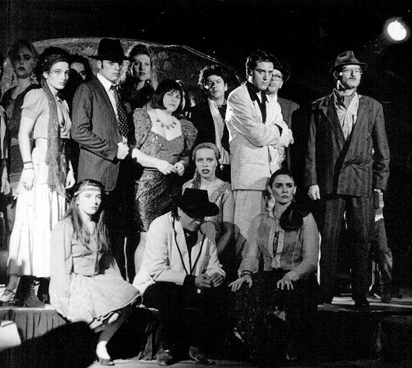 Fin d'une représentation théâtrale par la troupe Aleph pour la pièce "Christophe Colomb superstar" en 1992